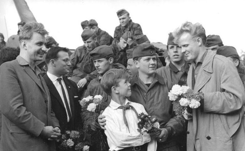 ADN-ZB-Hochneder-22.8.1961-Berlin: Kampfauftrag der FDJ wird erfüllt. Der Erste Bezirkssekretär der FDJ, Siegfried Lorenz (links), verabschiedete am 22. August eine Gruppe von Mitgliedern der Freien Deutschen Jugend, die sich entsprechend dem Kampfauftrag der FDJ verpflichtet hat, den Dienst bei der Deutschen Grenzpolizei aufzunehmen. Zu den zukünftigen Grenzpolizisten gehört Horst Dähn (rechts) vom VEB Bauunion Berlin.